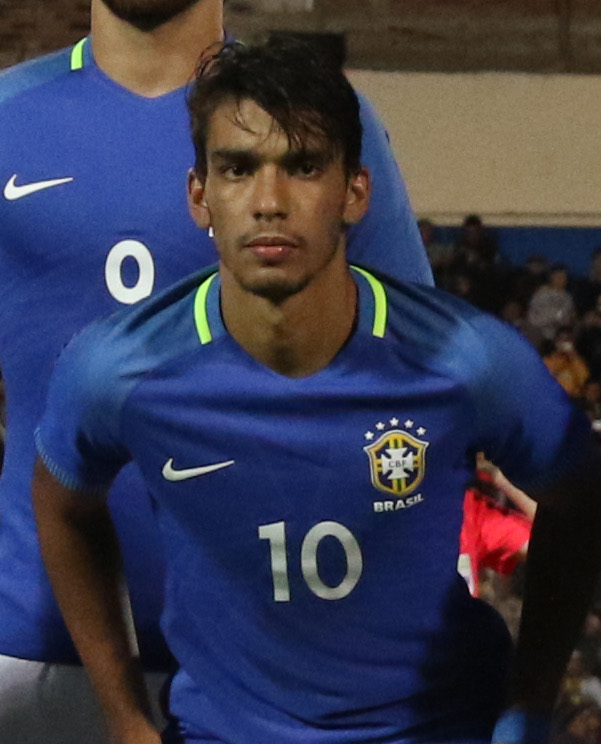 Riobamba, Ecuador, 18 enero 2017 (Andes).- El combinado ecuatoriano dirigido por Javier Rodríguez cayó 1-0 este miércoles ante Brasil en el marco de la primera jornada del Grupo A del Campeonato Sudamericano Sub 20 Ecuador 2017, durante el partido jugado en el estadio Olímpico de Riobamba (centro andino), abarrotado de hinchas. ANDES/Micaela Ayala V.